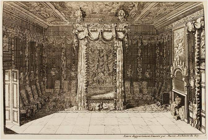 Llit